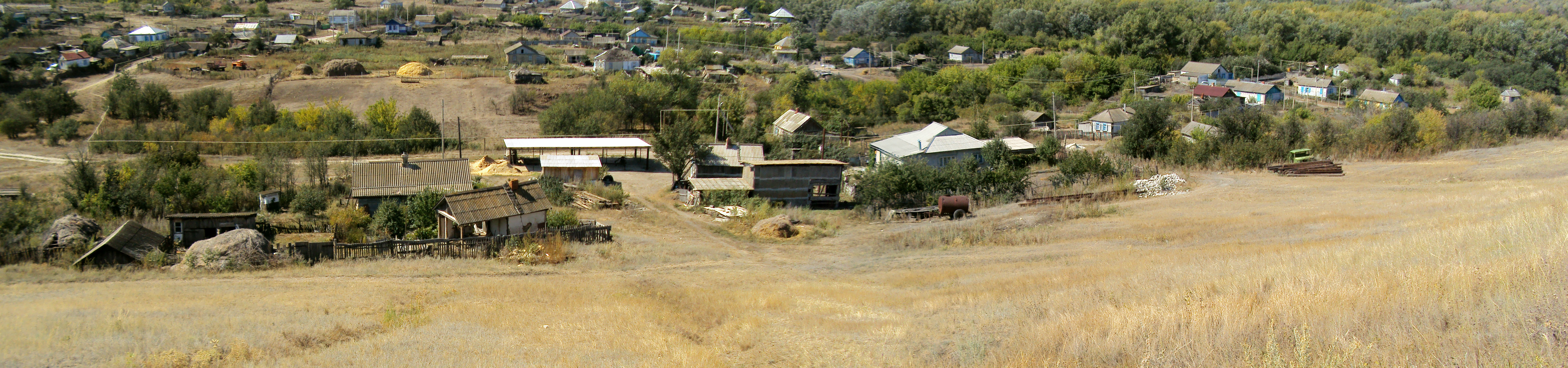 Панорама Затонского с восточной стороны